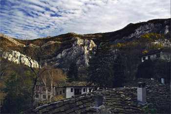 Черепишки Манастир, България, Манастири; 2006 Пламен Ташев